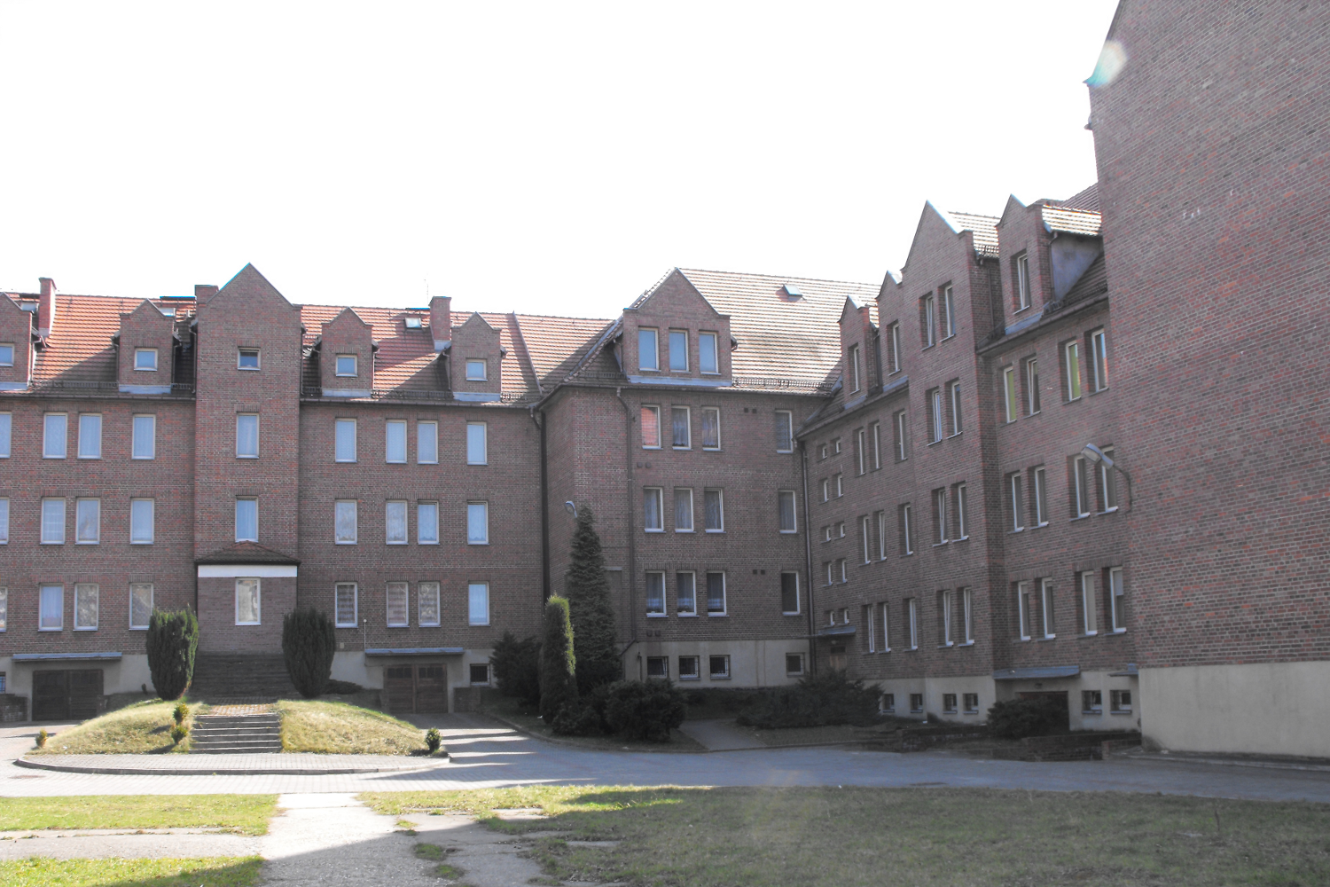 Parafia MB Kochawińskiej - dom zakonny, widok od strony kościoła zastepczego